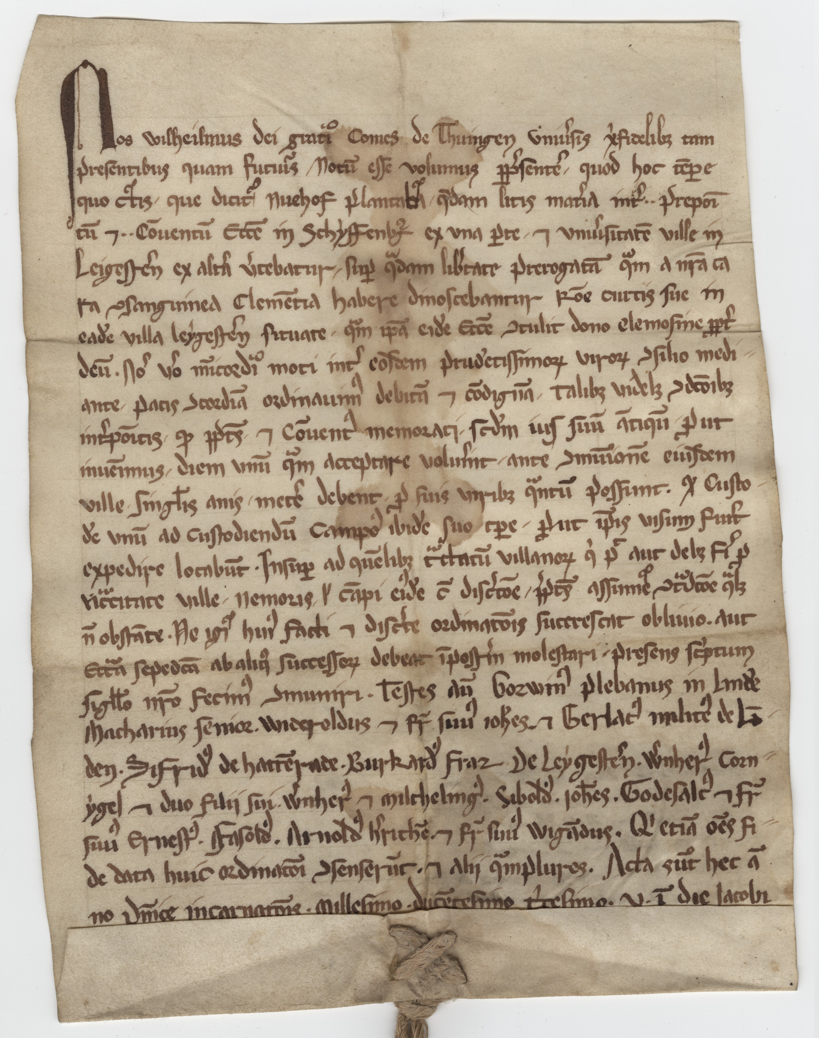 "Bei der ältesten Urkunde des Gießener Stadtarchivs handelt es sich um die Urschrift einer Fälschung, die zu Ende des 13. Jahrhunderts im Stift Schiffenberg angefertigt wurde: Graf Wilhelm von Tübingen, Stadtherr zu Gießen, entscheidet den bei Gründung des Neuhofs bei Leihgestern entstandenen Streit um bestimmte Nutzungsrechte zwischen dem Stift Schiffenberg und der Gemeinde Leihgestern zu Gunsten der Augustinerchorherren." [1]